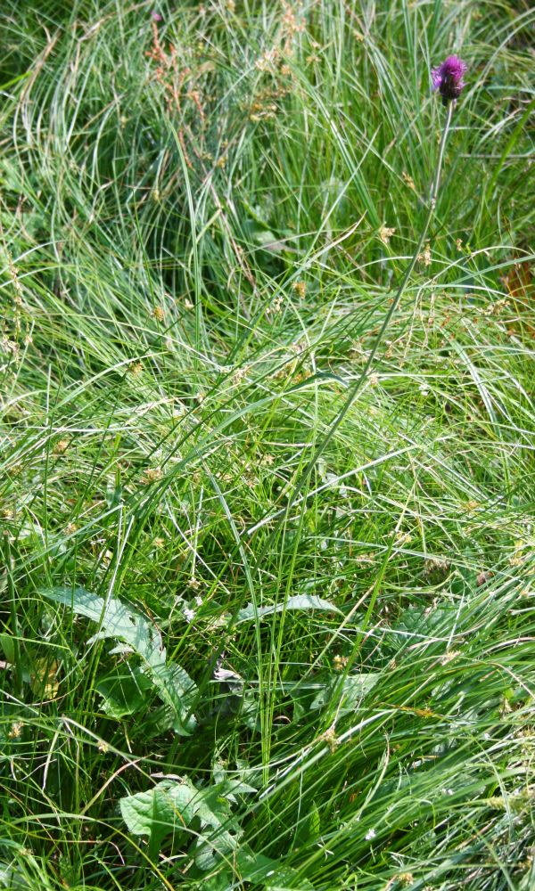 Bach-Kratzdistel (Cirsium rivulare), Korbblütler (Asteraceae) - Österreich/Austria/Autriche: Oberösterreich, Hausruckviertel, Kien NW Attnang-Puchheim